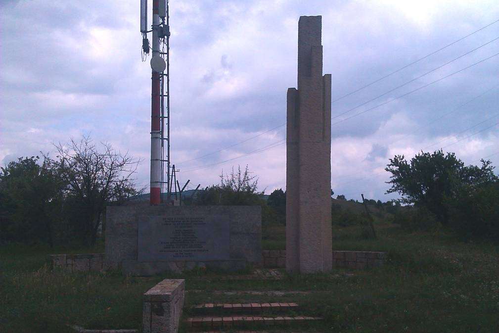 Споменик кај Пуста Кула